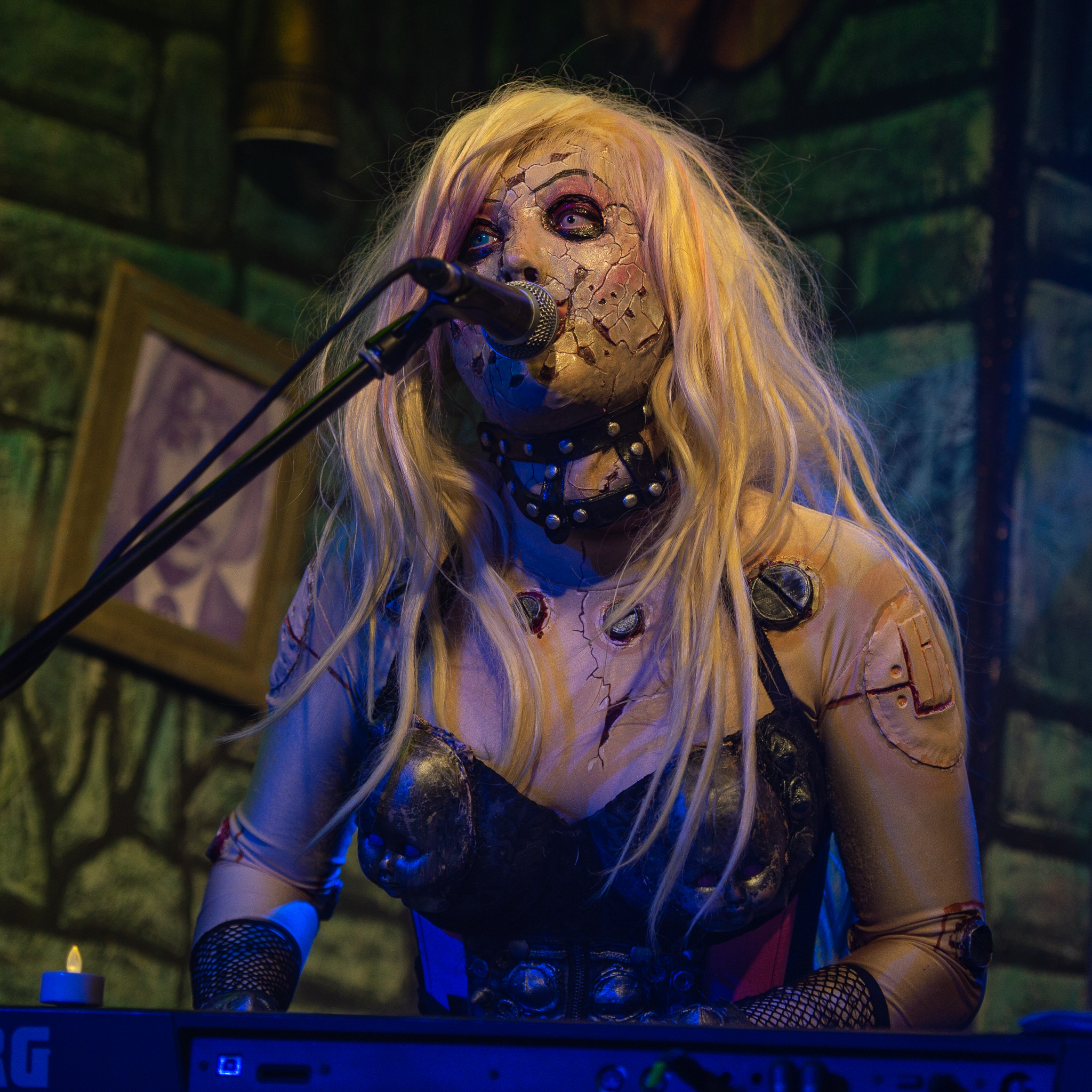 Concertbüro Franken,Der Hirsch,Hella,Henna-Riikka Paakkola,Konzert,Livekonzert,Livemusik,Lordi,Musik